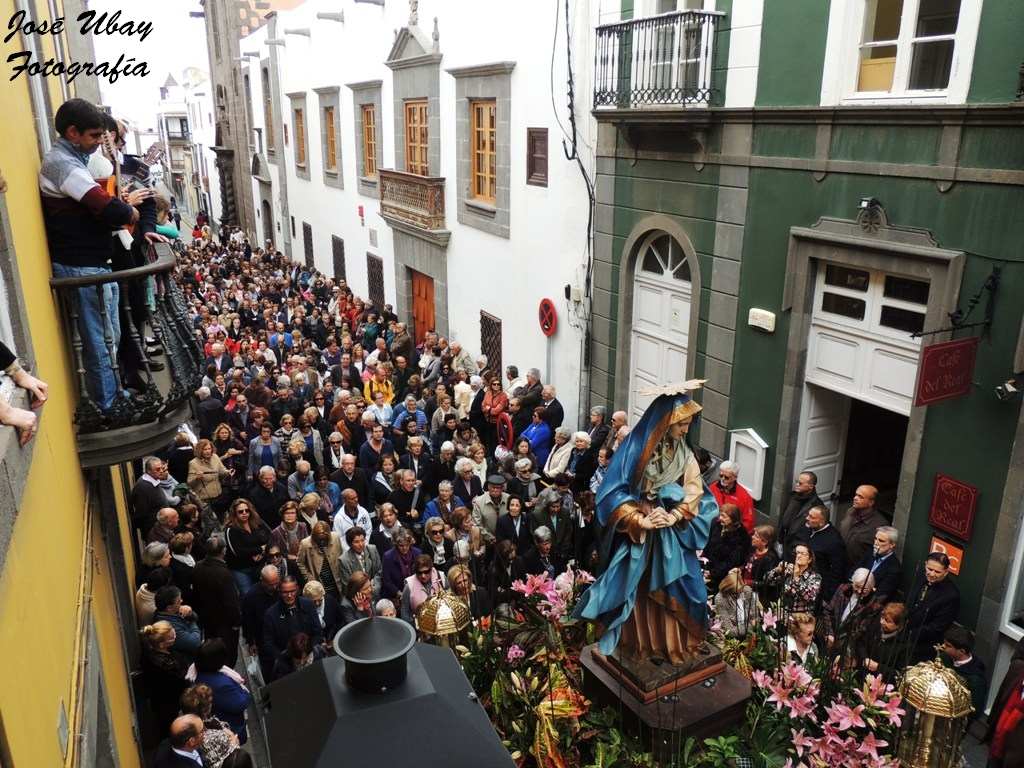 Salida Procesional del Santísimo Cristo de la Sala Capitular y Nuestra Señora de los Dolores. Catedral de Canarias. Las Palmas de Gran Canaria. Viernes Santo, 25 de marzo de 2016.